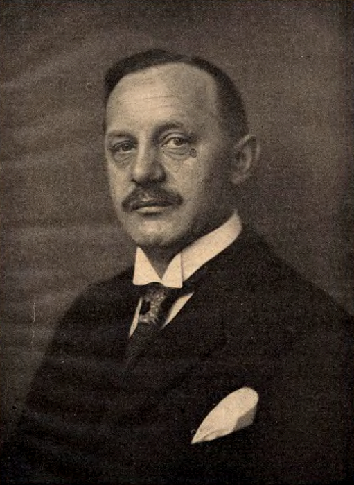 Porträt des oberschlesischen Oberpräsidenten Dr. Proske, fotografiert durch Max Glauer.